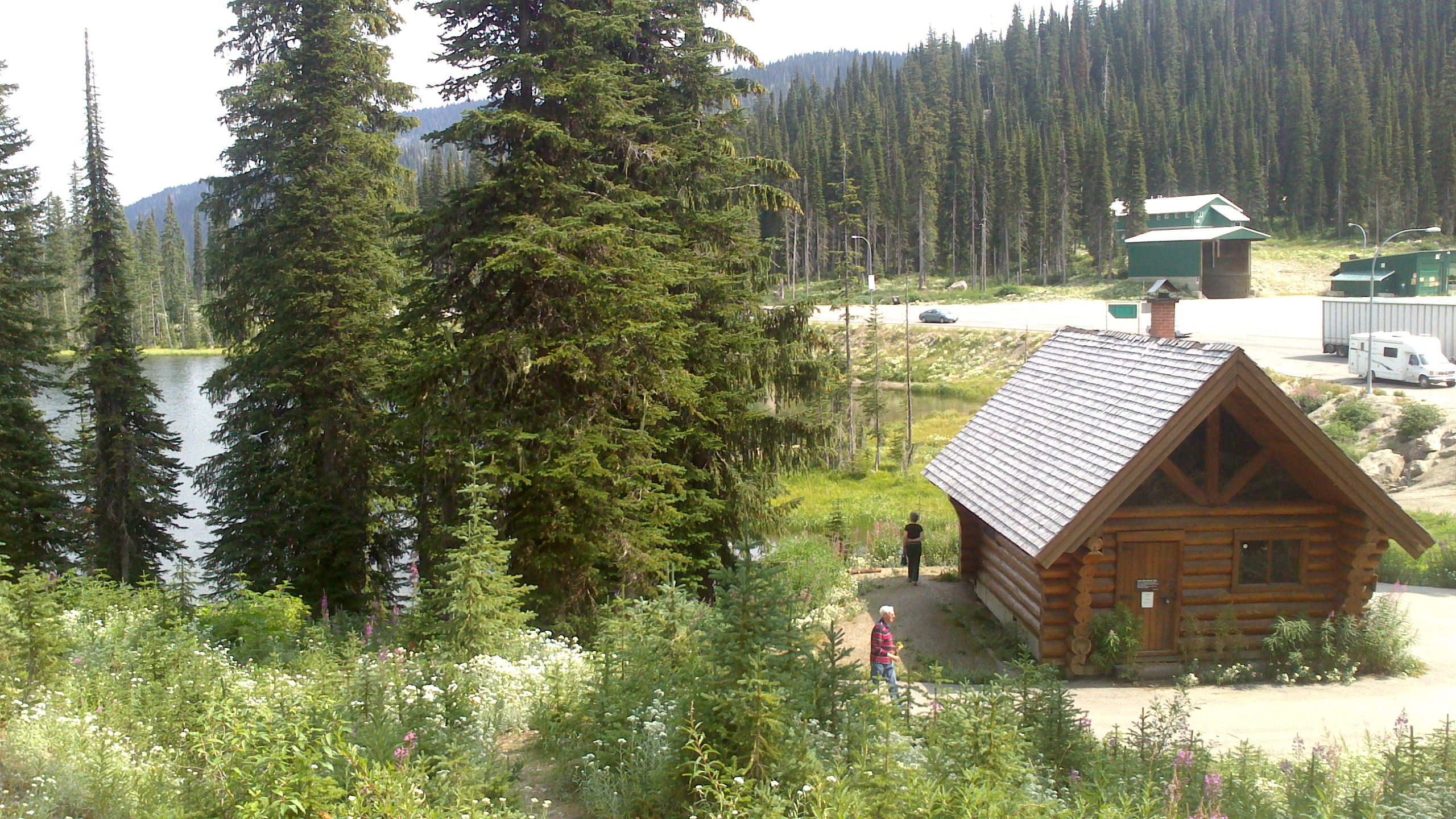 Summit Cabin